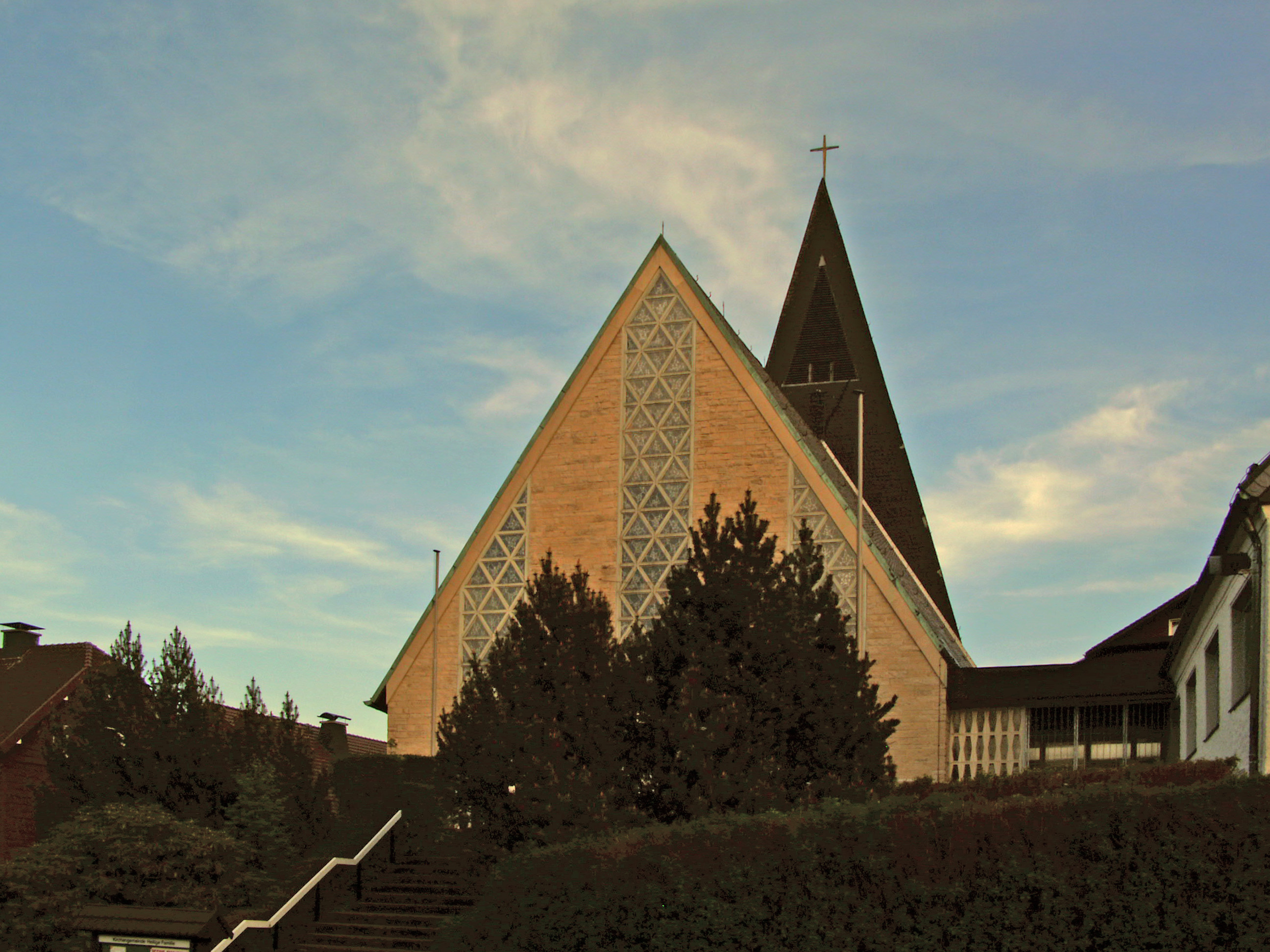 Katholische Kirche Heilige Familie in Barunlage, Landkreis Goslar